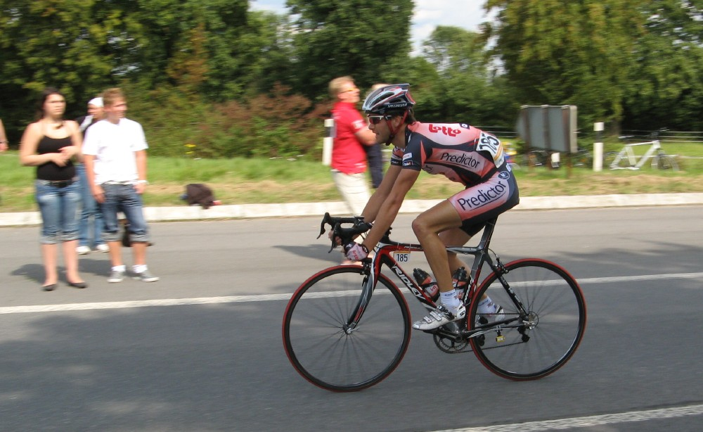 Pieter Mertens beim Radrennen Vattenfall Cyclassics 2007 bei Kilometer 109, Abzweigung Pinneberg-Süd (Waldenau)